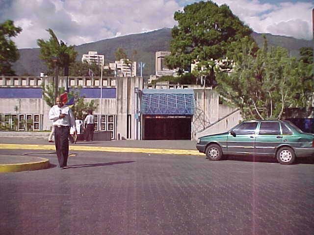 Metro de Caracas Linea 1 Estacion Colegio de Ingenieros, en municipio Libertador, Distrito Capital - Venezuela (2000)